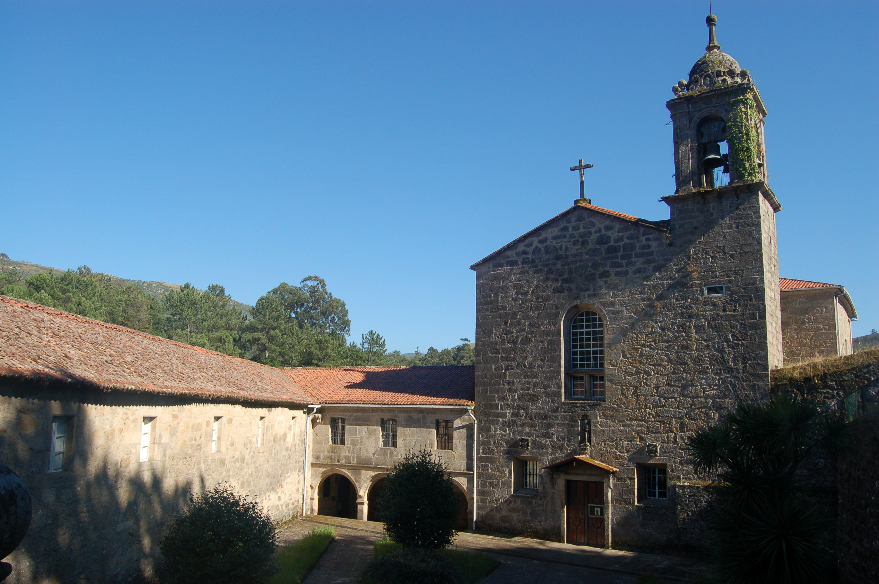 Convento de San Francisco en Herbón (Padrón)